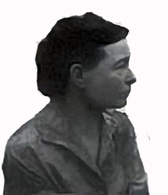 Cropped Beauvoir